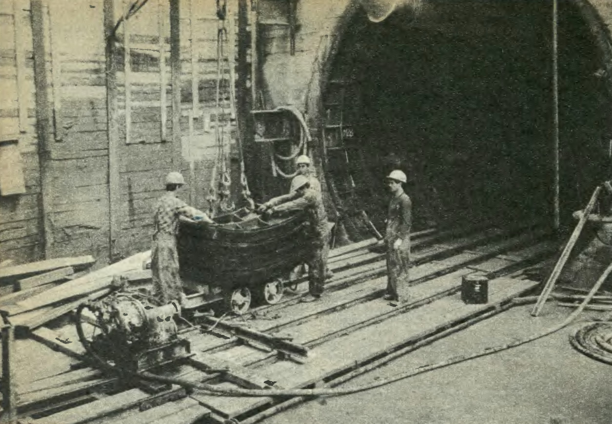 Szyb startowy tunelu szlakowego metra B11 Pole Mokotowskie-Politechnika, czerwiec 1985.